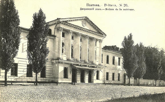 Будинок_Полтавського_дворянського_зібрання.jpg: Будинок Полтавського дворянського зібрання, початок 20 століття